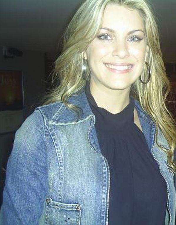 A modelo brasileira Renata Fan, ex-Miss Rio Grande do Sul